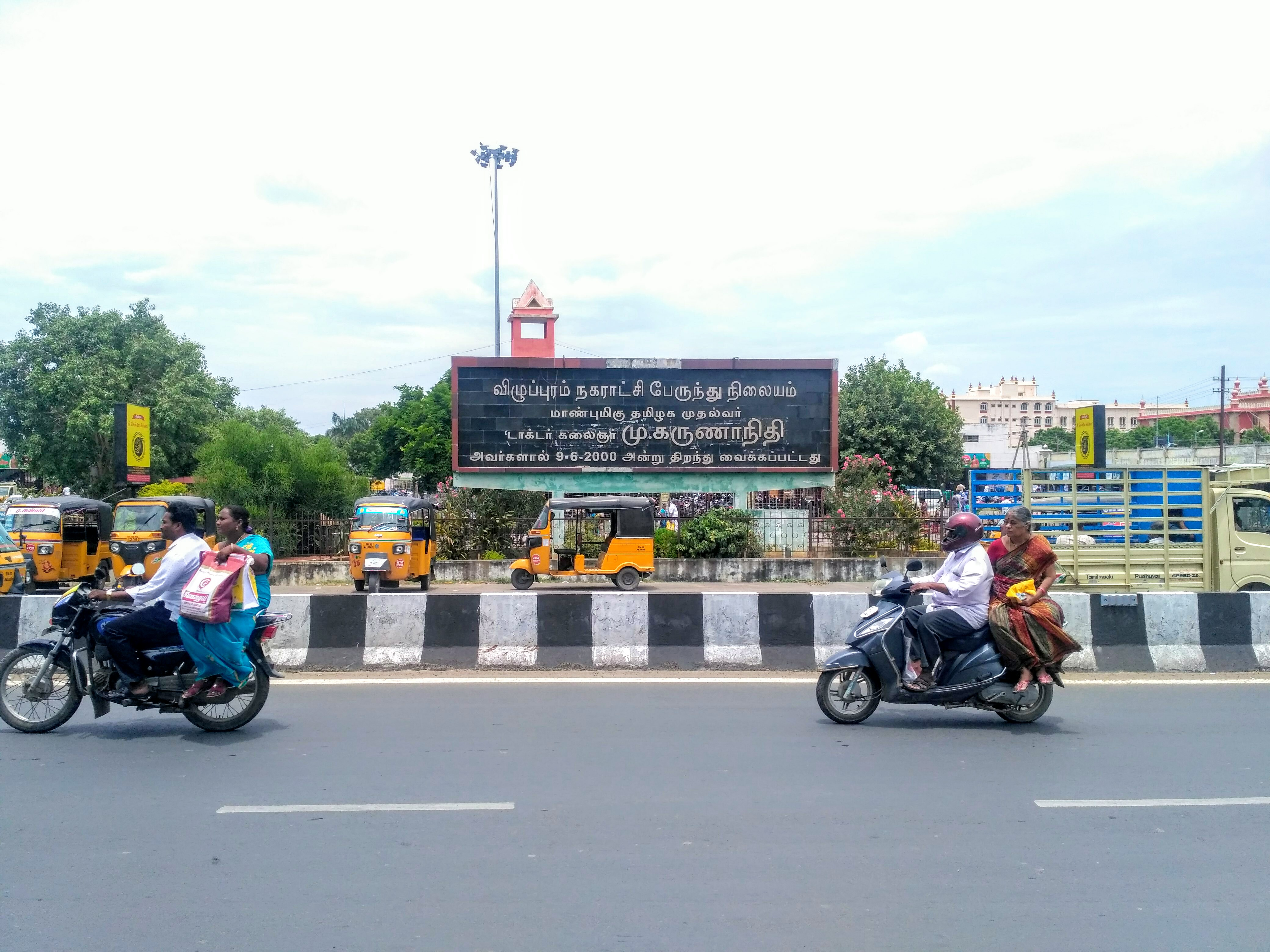 விழுப்புரம் பேருந்து நிலையத்தின் முகப்பு பகுதி..